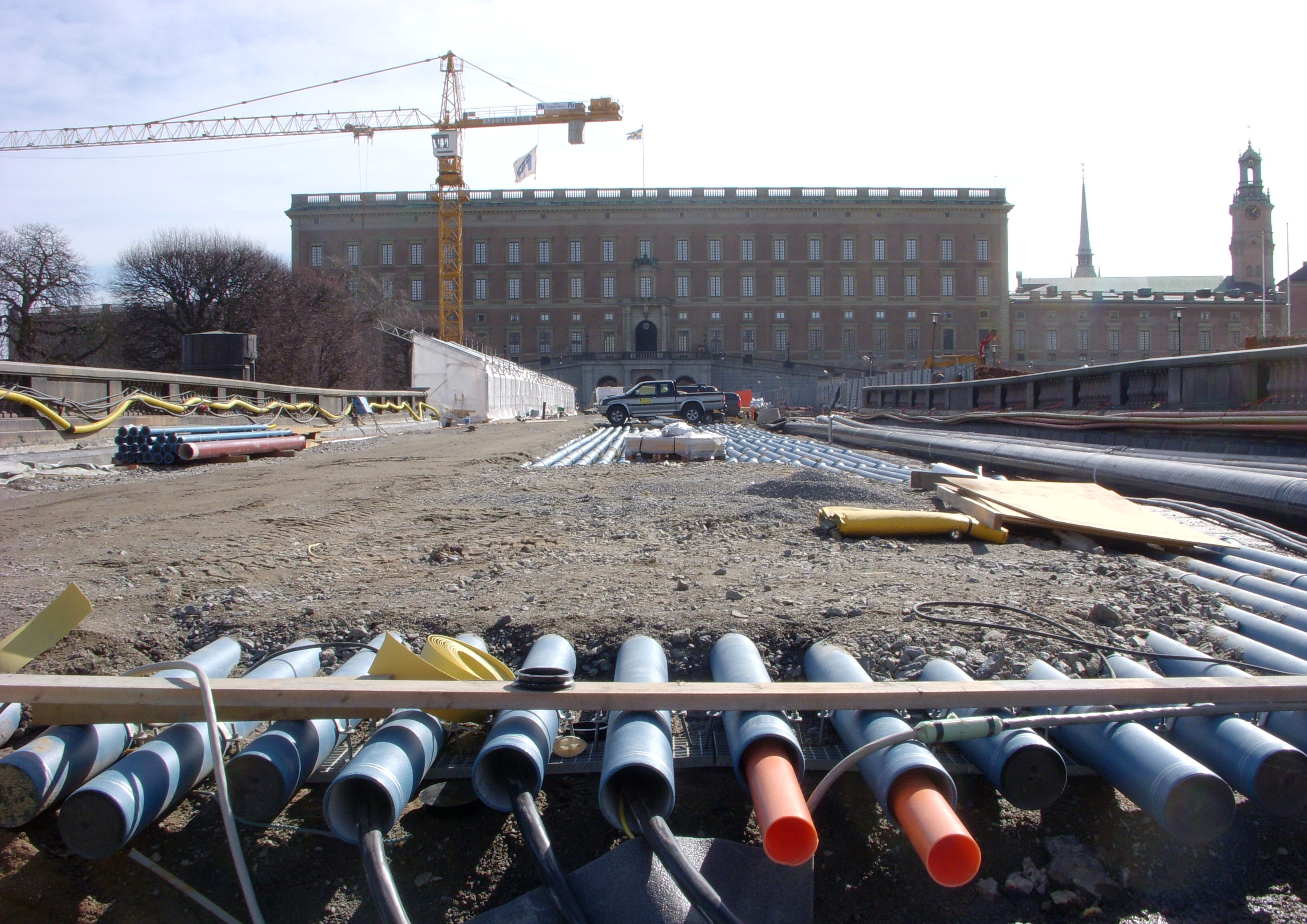 Norrbro i Stockholm renoveras